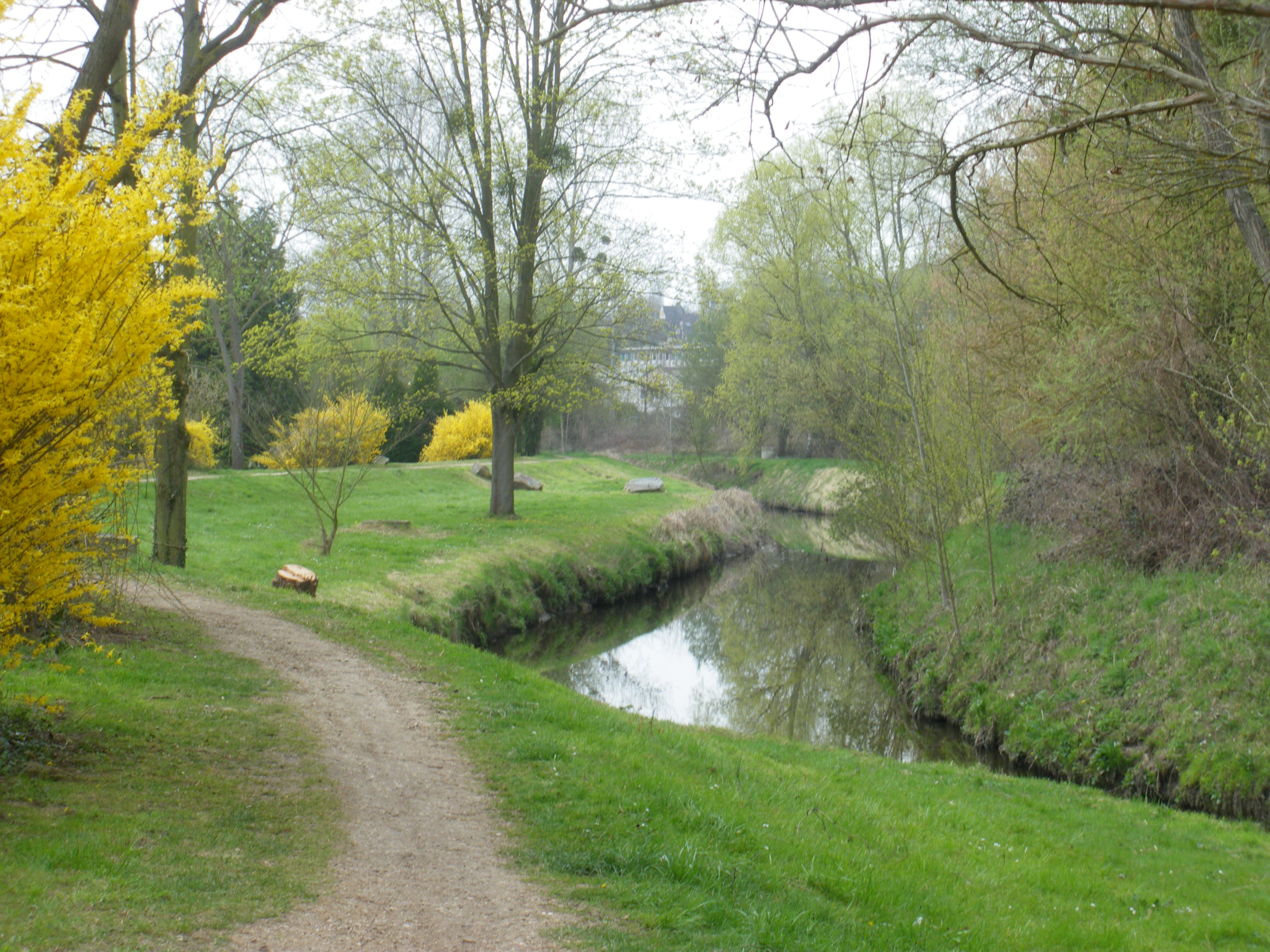 L'Yvette, à l'entrée de l'Université Paris XI, Bures sur Yvette, France